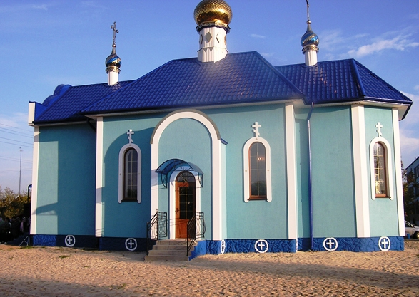 Храм-часовня Казанской иконы Божьей Матери